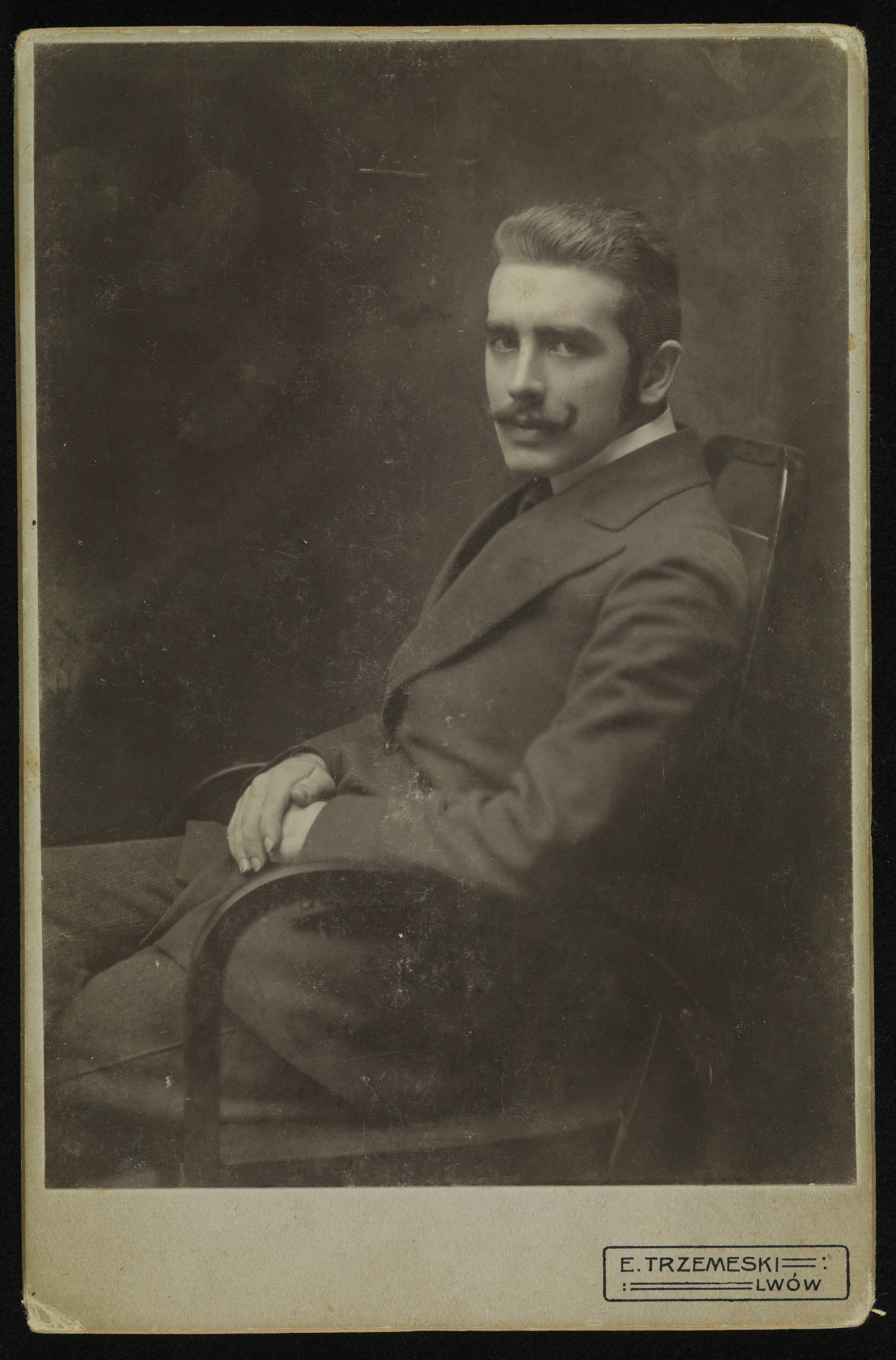 Stanisław Feliks Bryła, ok. 1914 r.